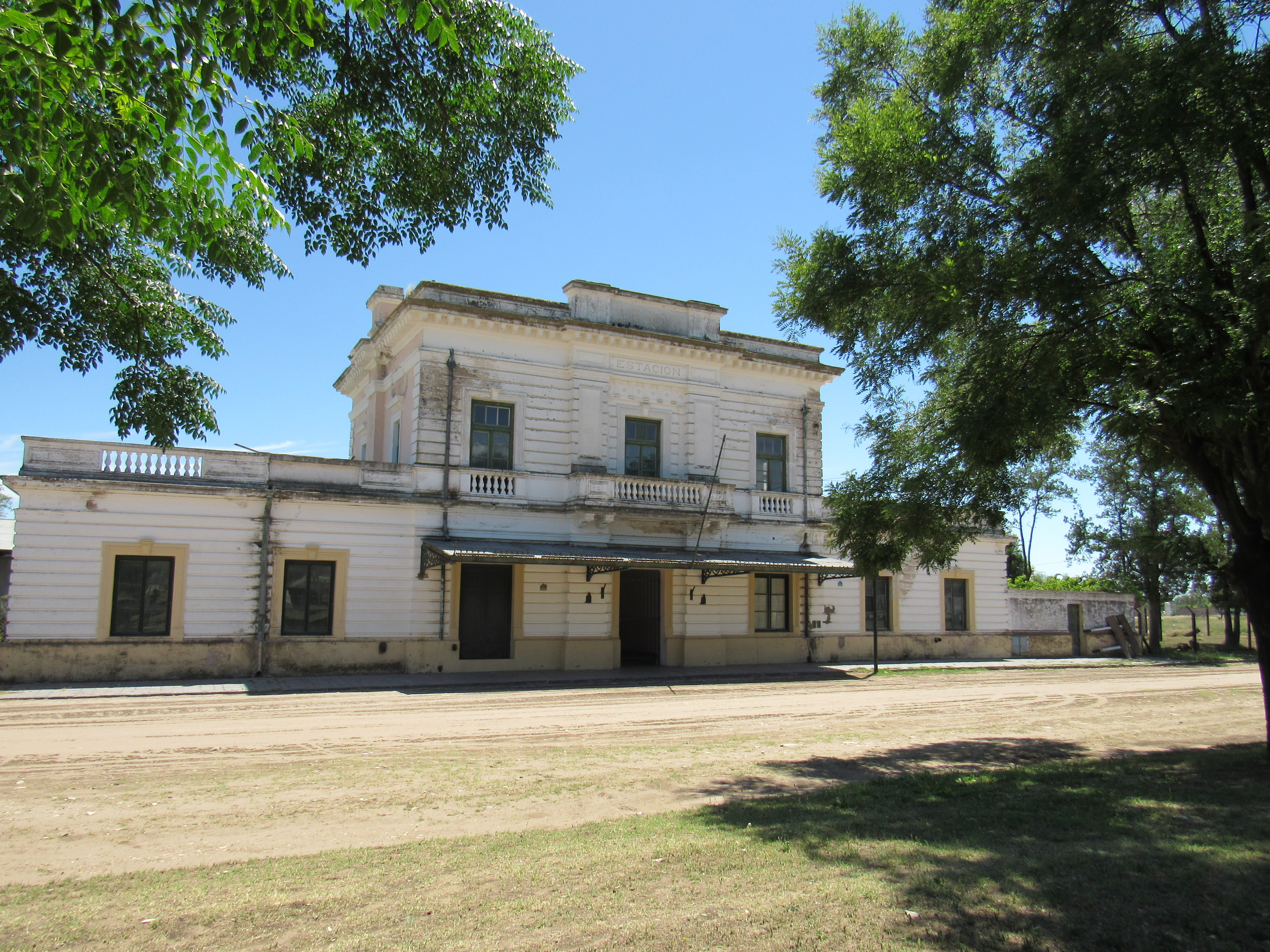 Estacion de ferrocarril de General Acha, La Pampa